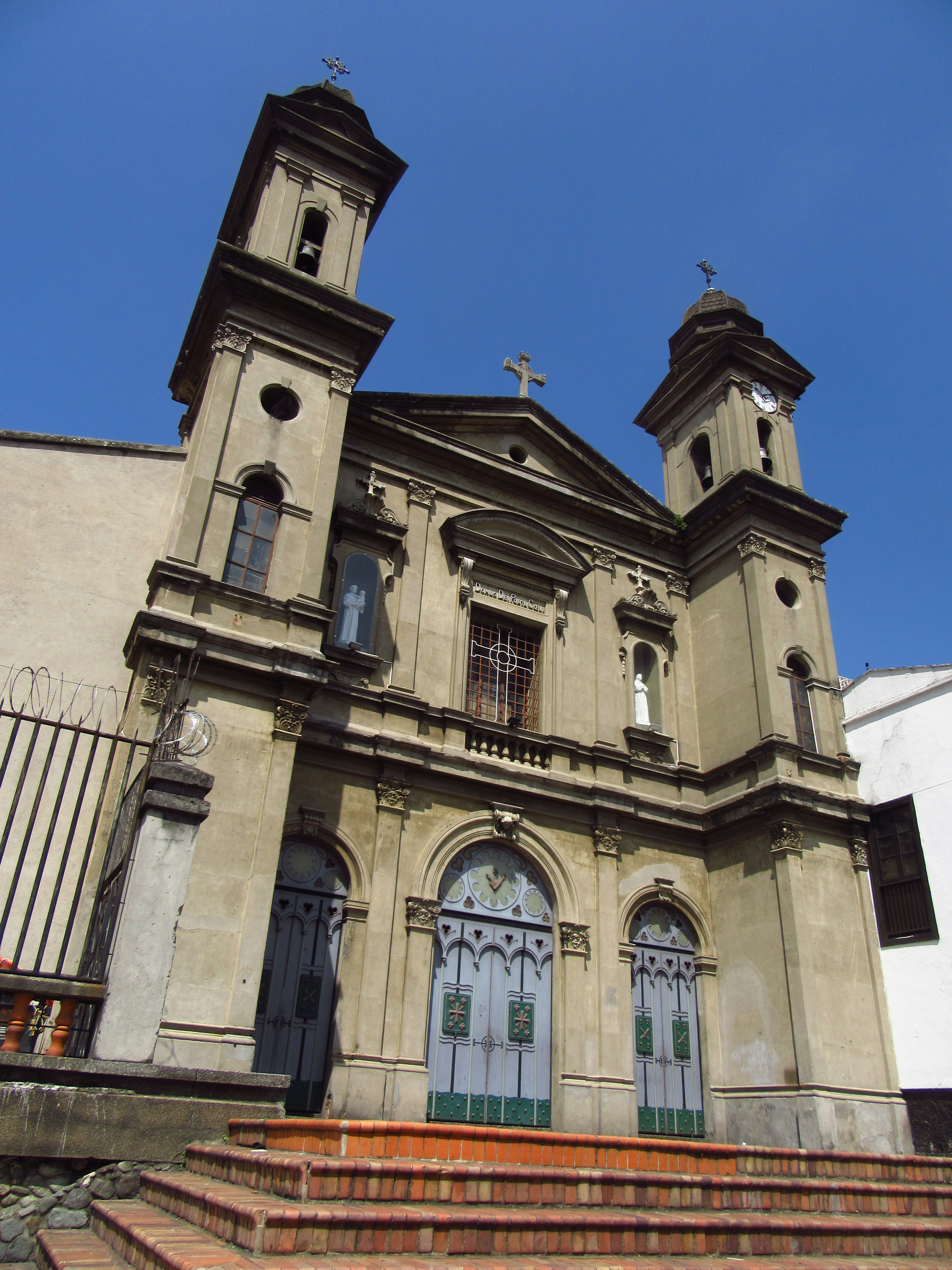 La iglesia de San Antonio es un templo religioso de culto católico bajo la advocación de san Antonio de Padua en la ciudad de Medellín, Colombia.